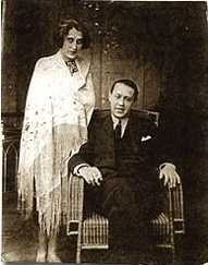 Sándor Márai i Ilona Matzner el dia del seu cassament el 17 de julio de 1923